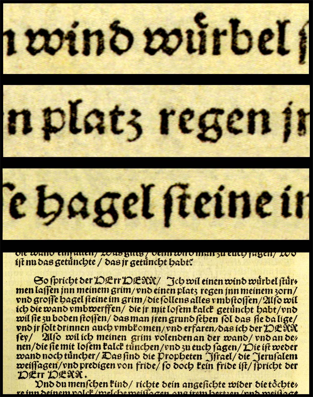 Windwirbel, Platzregen und Hagelsteine in der Schreibweise der Lutherbibel 1534